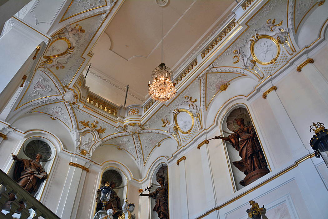 Steigenaufgang im Coprs de Logis, Schlss Ludwigsburg